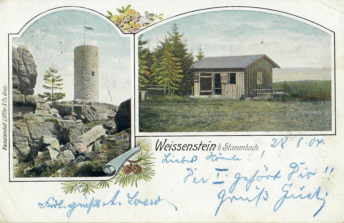 Postkarte vom Weißensteinturm